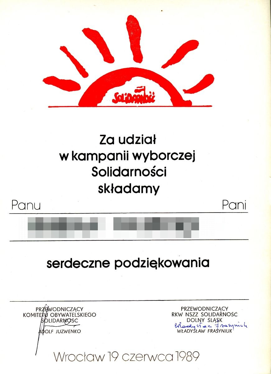 Dyplom za udział w kampanii wyborczej 1989, podpisany przez Adolfa Juzwenkę i Władysława Frasyniuka.